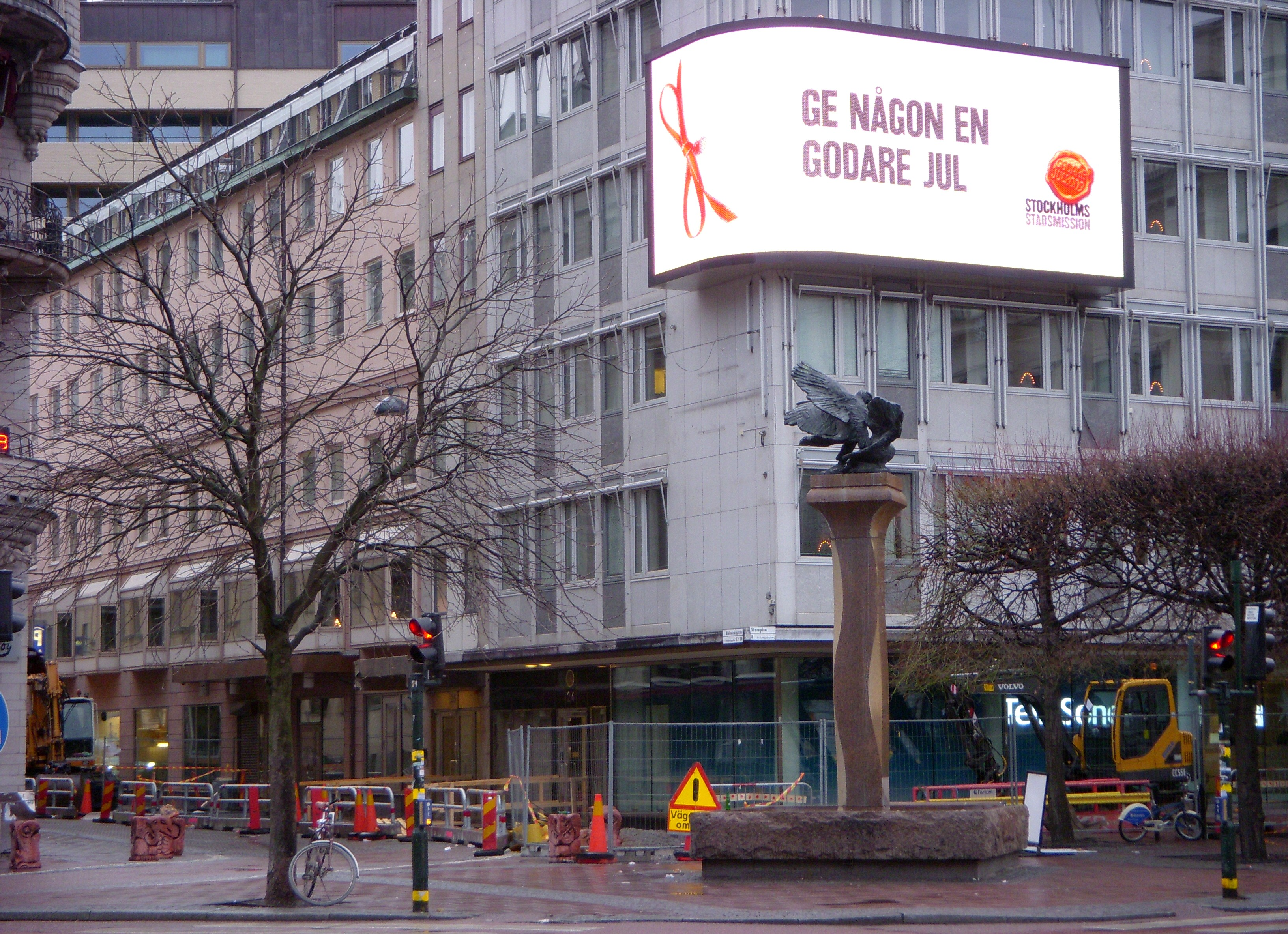 Kvarteret Ladugårdsgrinden 18 från Kungsgatan, Stockholm